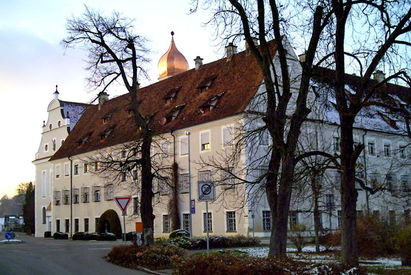 Ehemaliges Kloster, Pfleghof und Turm der röm.-kath. Kirche St. Martin in 88459 Tannheim, Baden-Württemberg, Deutschland - Heute Sitz der Gräflich von Schaesberg'schen Forstverwaltung